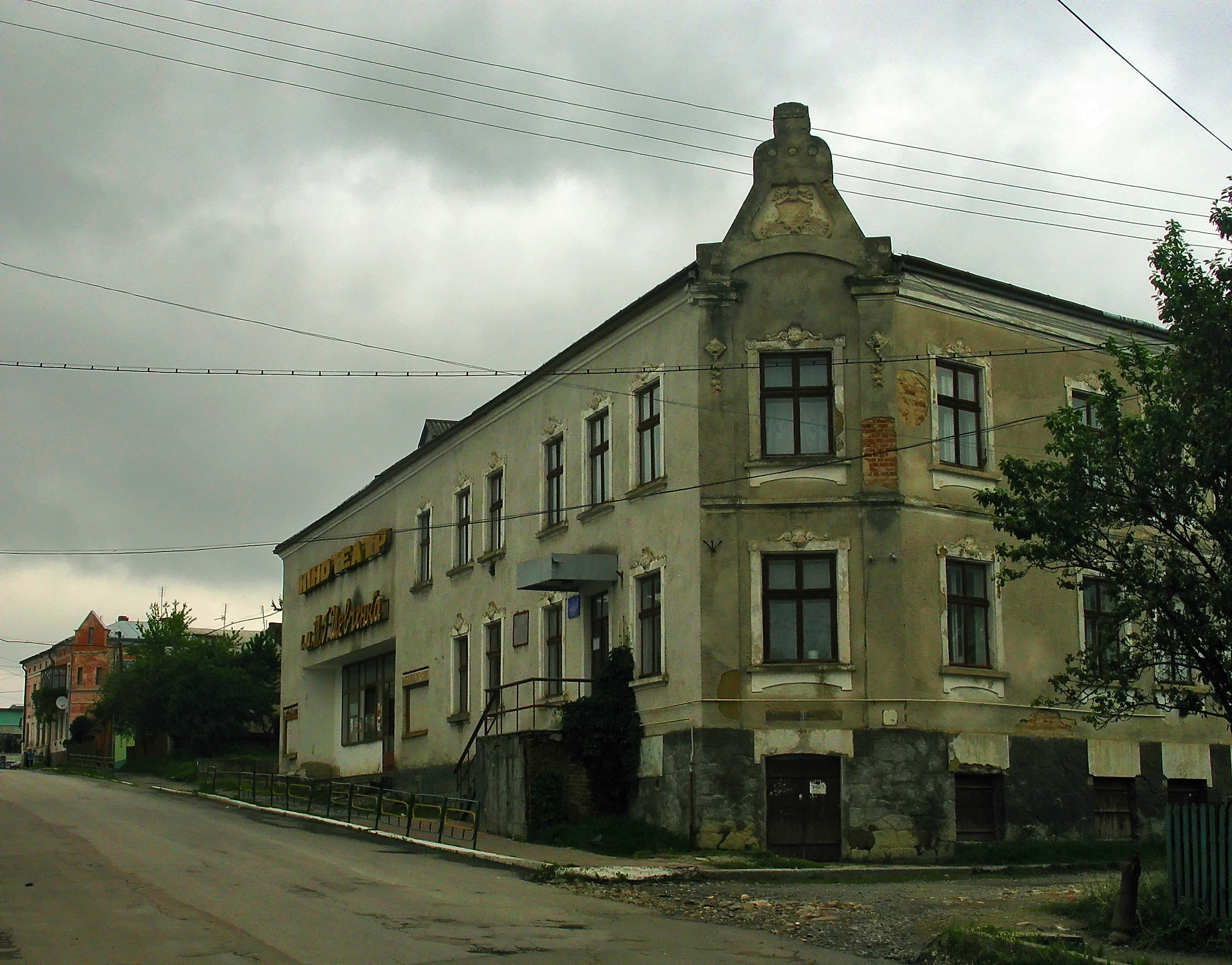 Український народний дім(мур.), Копичинці, вул.Галана,9